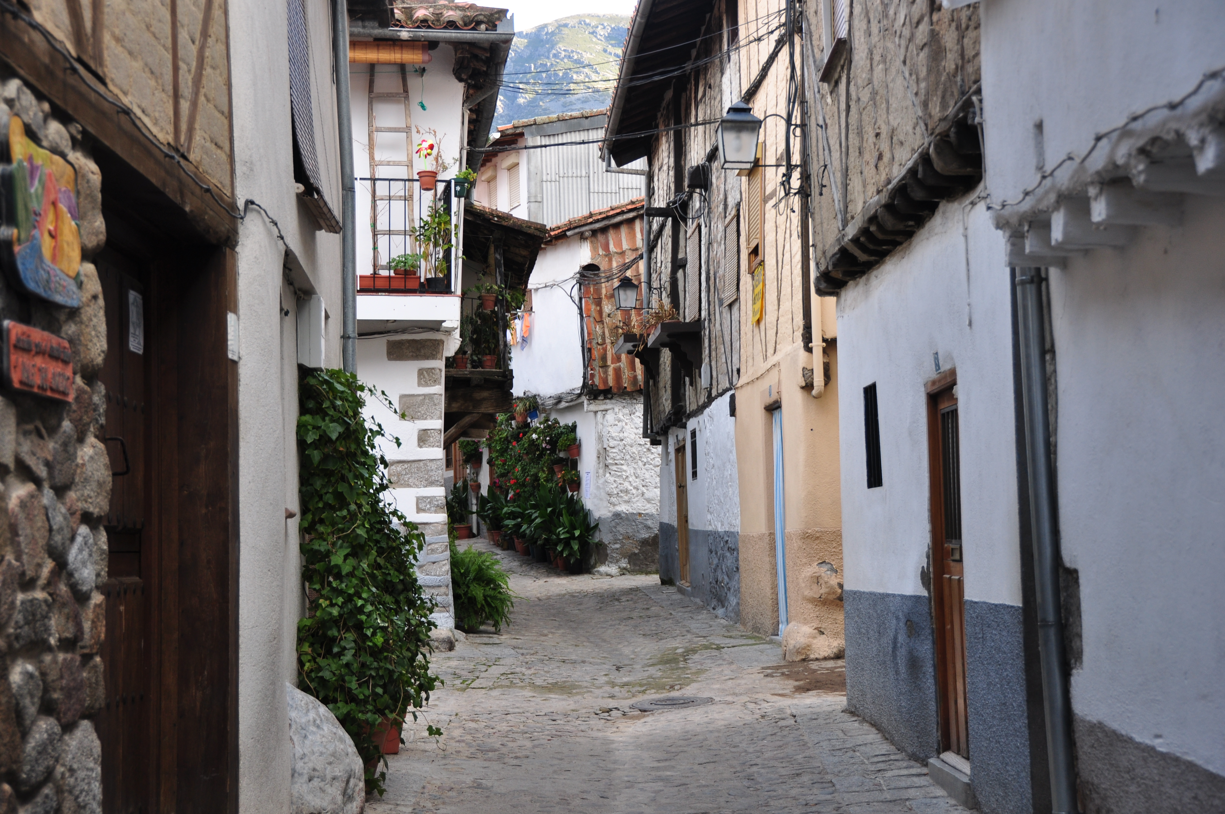 Barrio Judío de Hervás.